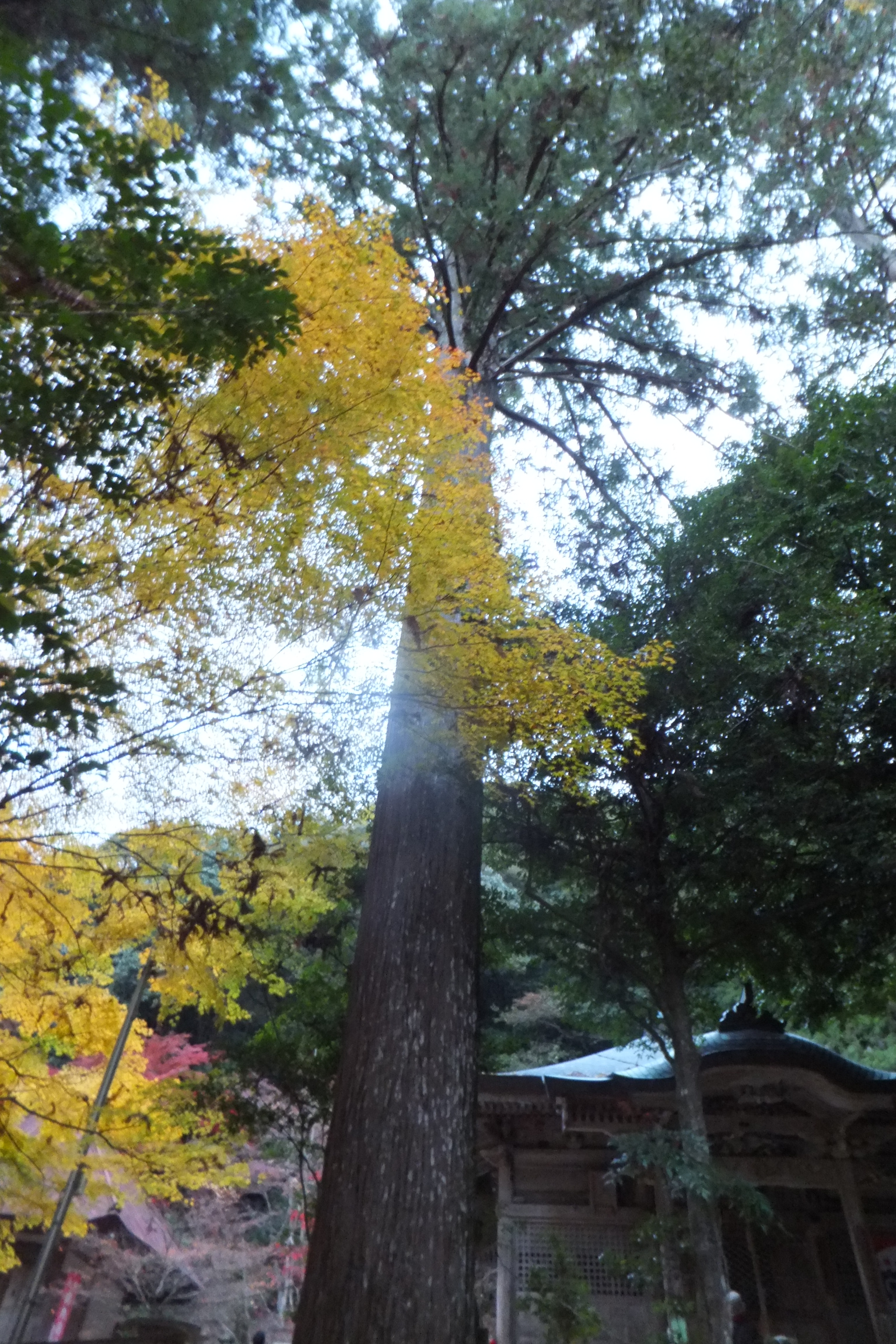 石龕寺（2013年11月23日）